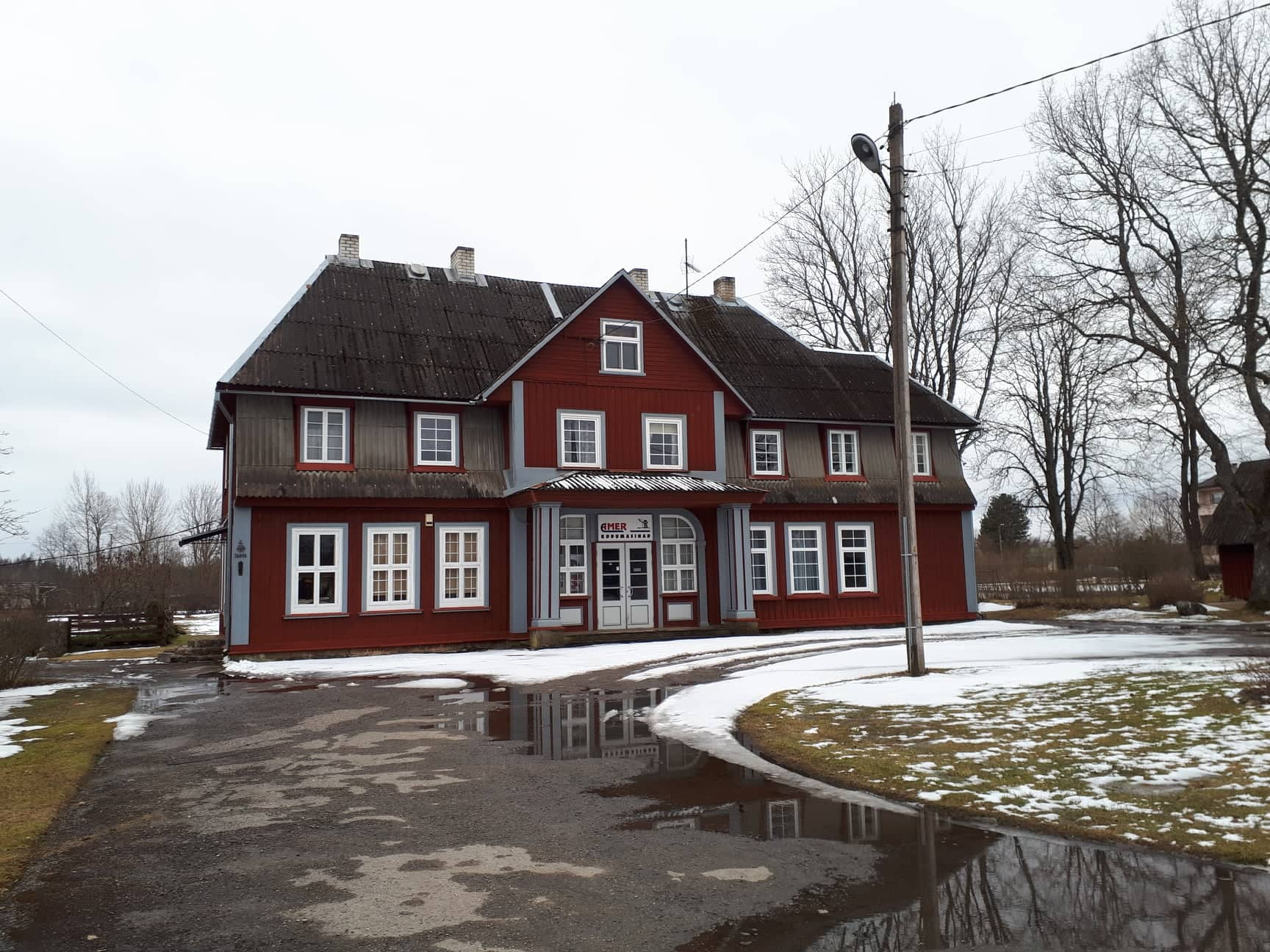 1928. aastal Leon Johansoni projekti järgi ehitatud Vändra jaamahoone. Jaamahoone ehitati tüüpprojekti järgi sarnaselt Eidapere, Sindi, Tori ja Viluvere jaamahoonetega. Hoone oli kasutusel kuni raudtee sulgemiseni 1969. aastal ning on säilinud tänaseni. Tegutsenud hilisemalt poena.